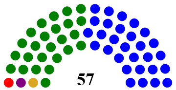 Conformacion del Congreso en ese periodo